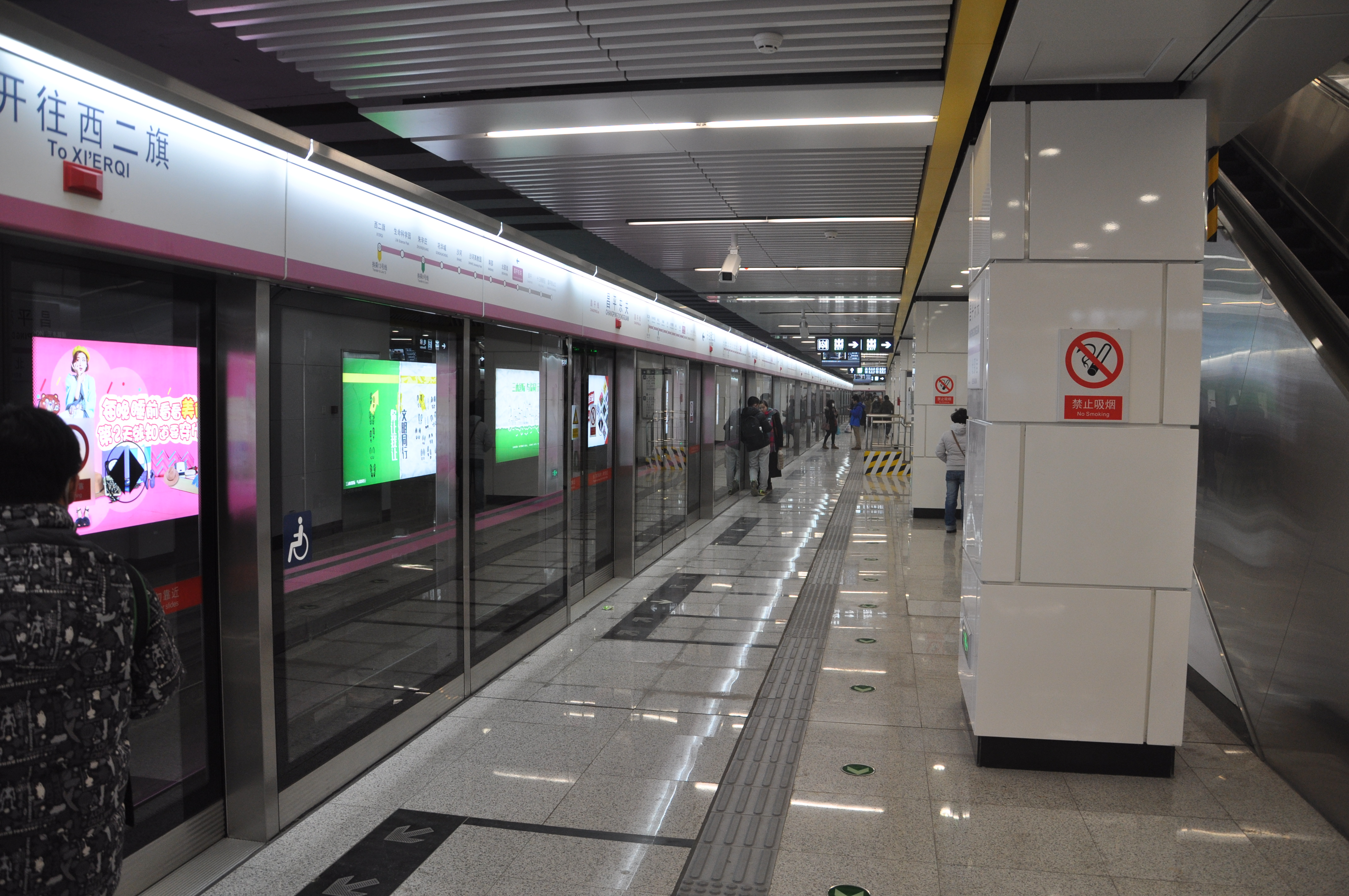 北京地铁昌平线昌平东关站站台。